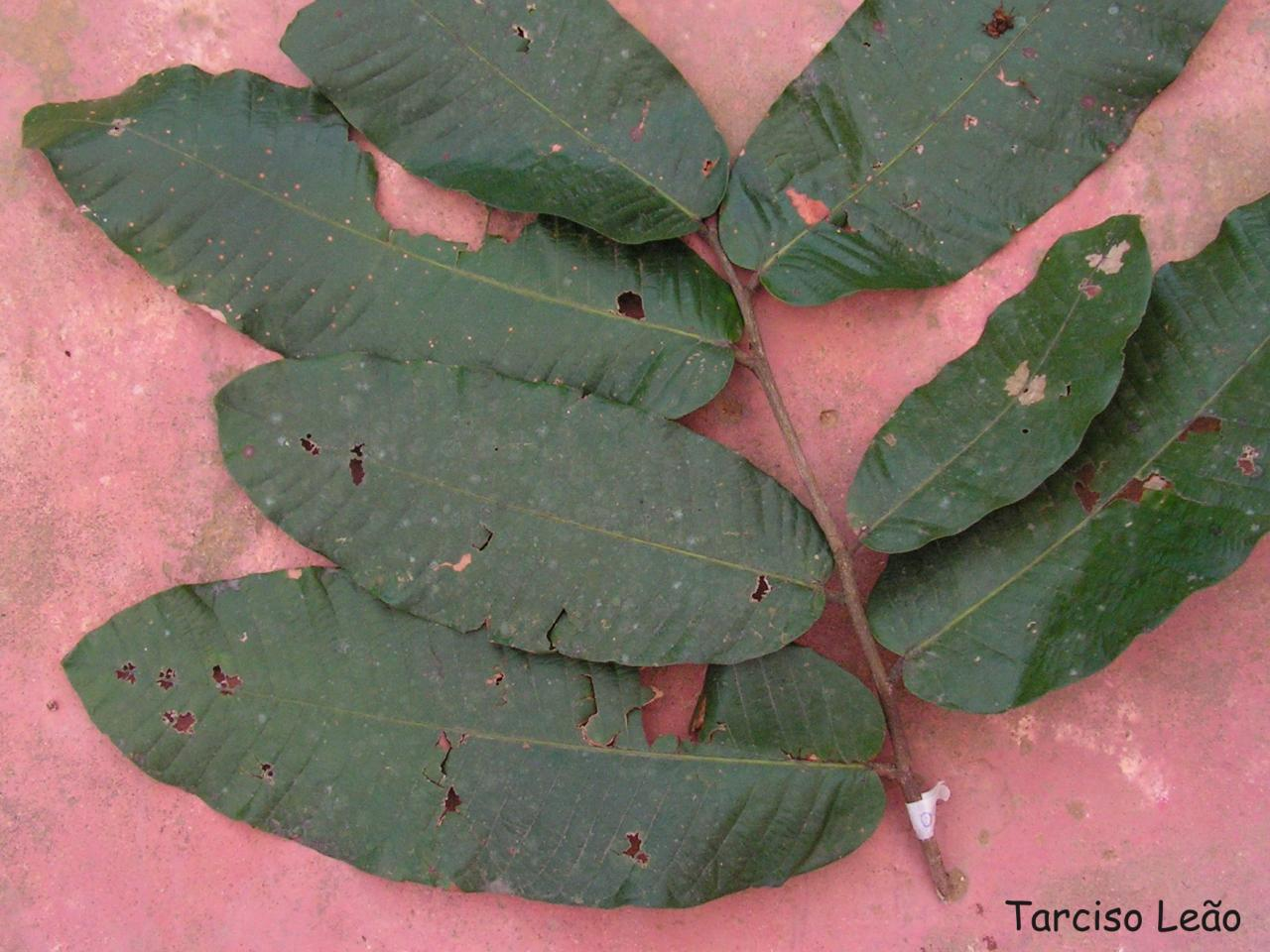 Local: Mata do Sabiá, Cabo de Santo Agostinho, Pernambuco, Brasil. Tipo de veg.: Floresta Ombrófila Densa Habito: árvore